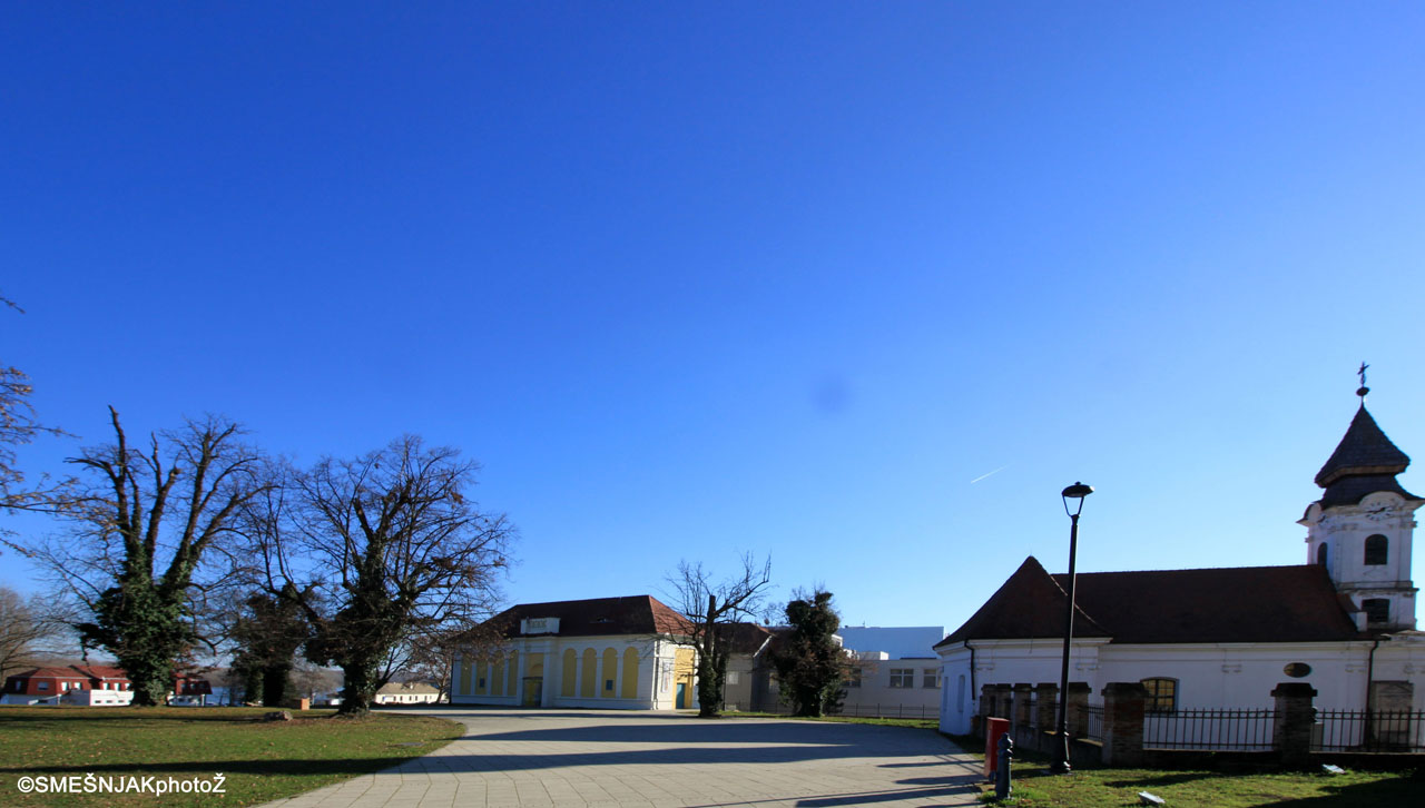 Kompleks vlastelinstva Eltz, Županijska 1, 2, 3, 4, 5 i 7, Gradski muzej Vukovar